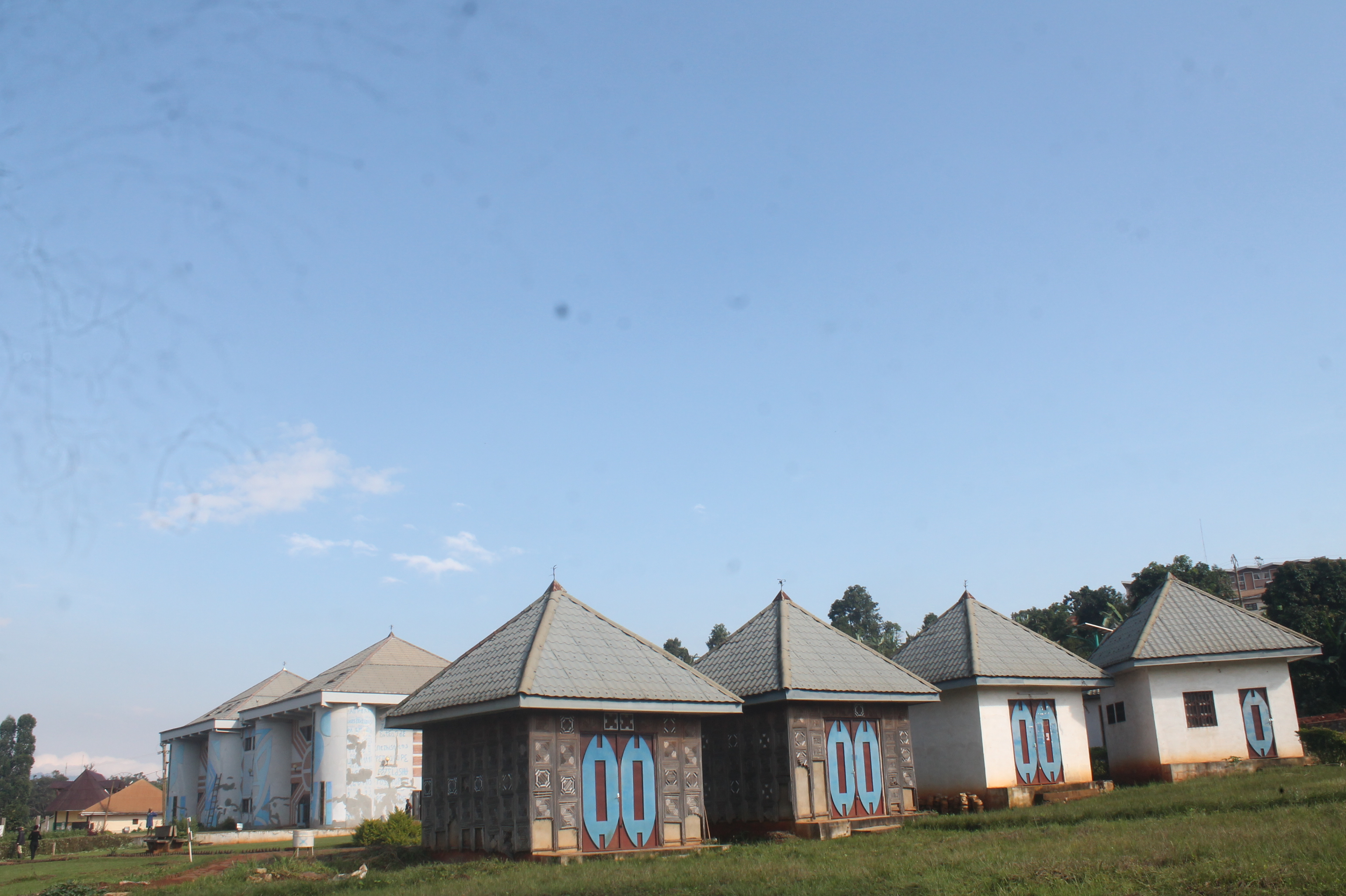 Vue de quelques batiments du musée des civilisations a FOTO